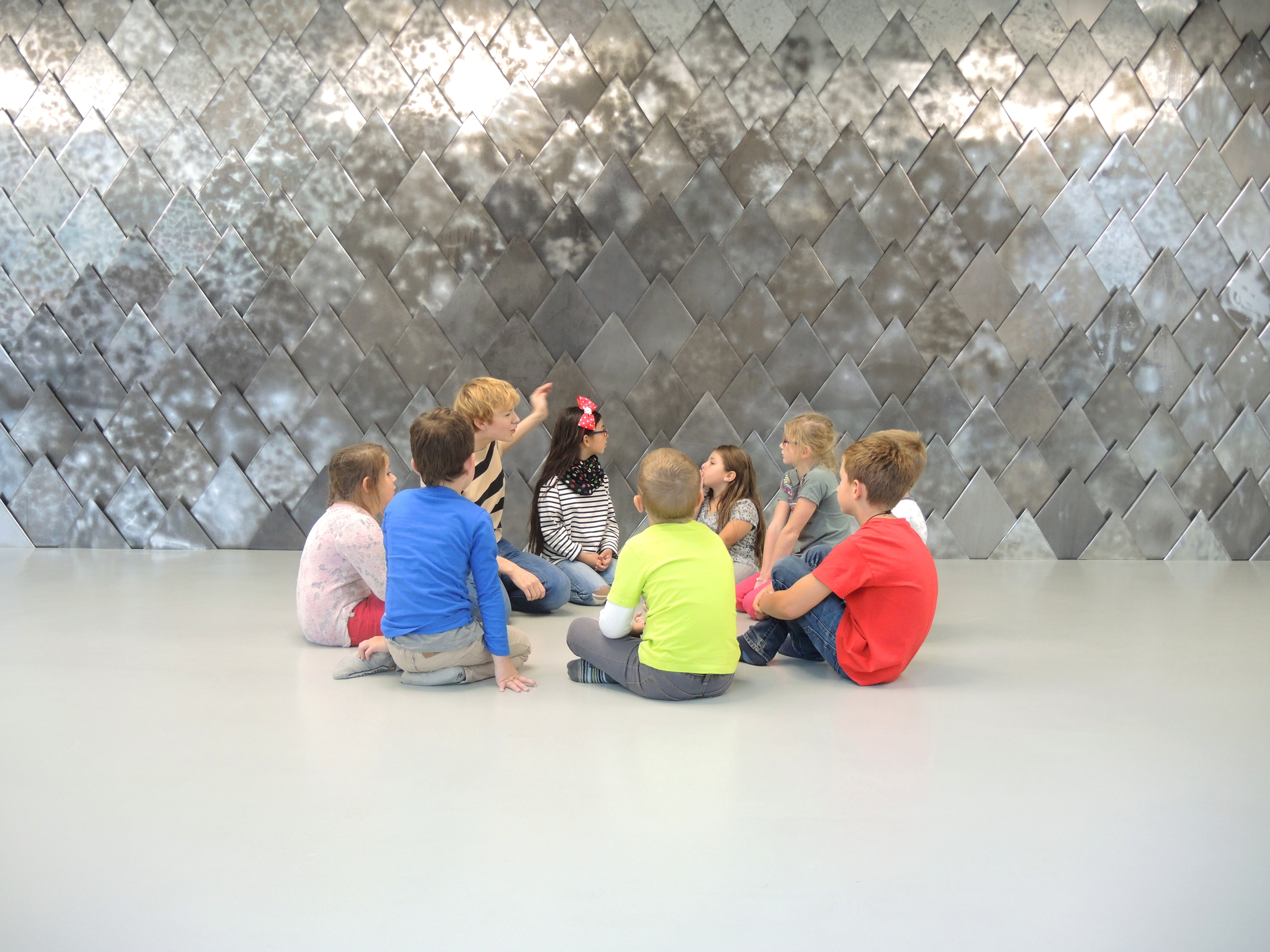 Visite guidée jeune public, MBAL, 2015.